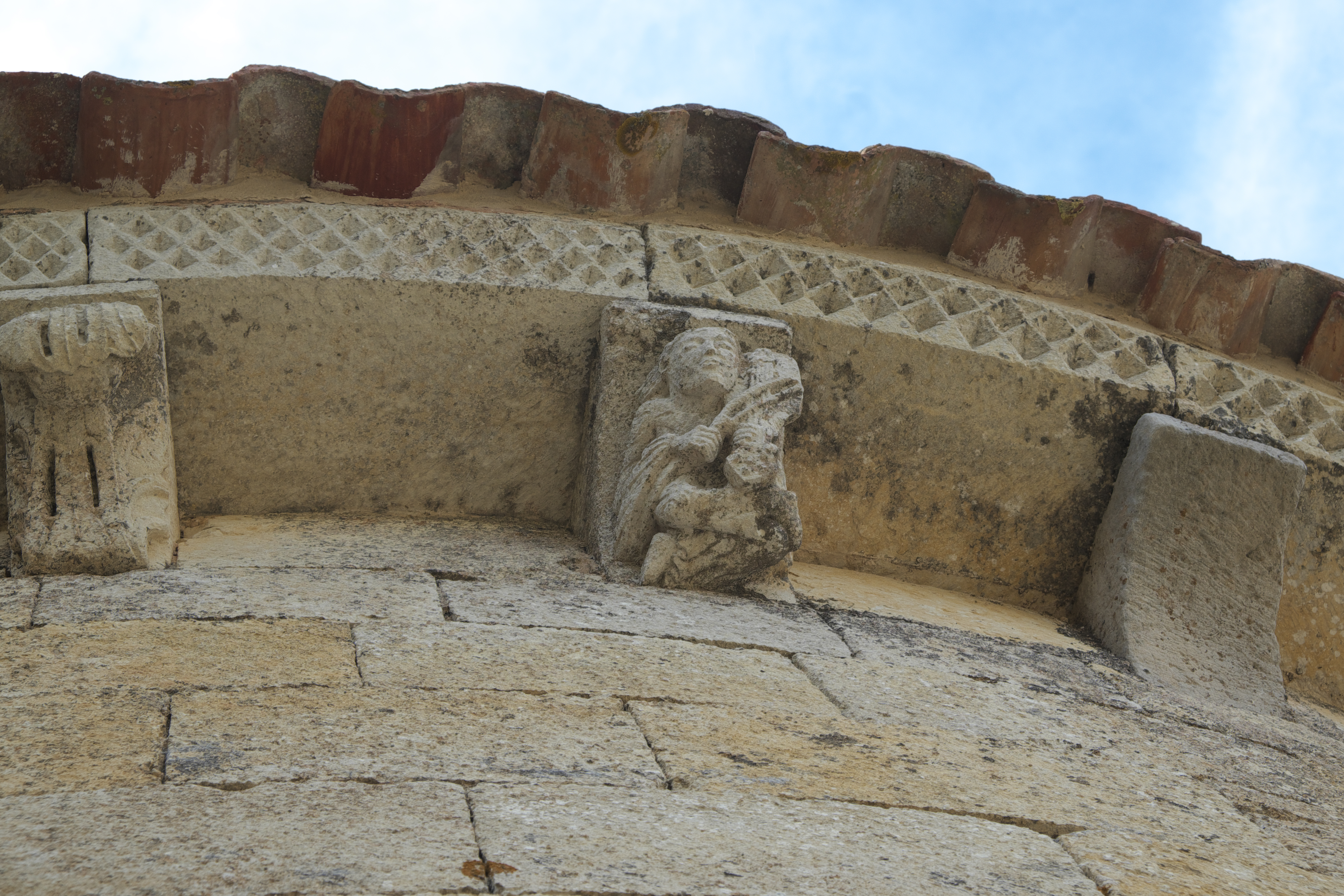 Ermita de Santa Cecilia in Vallespinoso de Aguilar in der Provinz Palencia (Kastilien-León/Spanien), Kragstein, Darstellung: Musikant